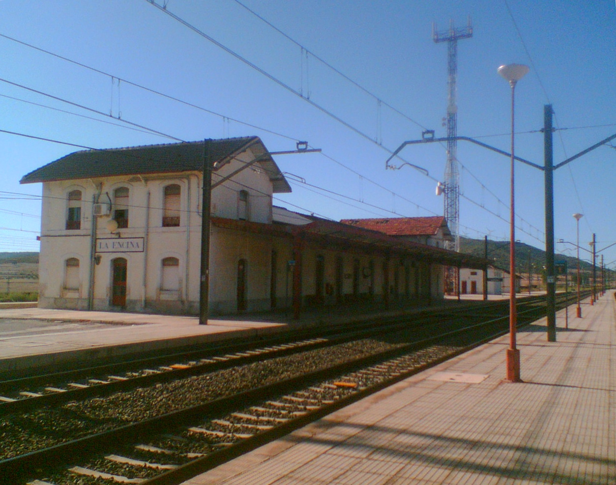 Estación de La Encina.